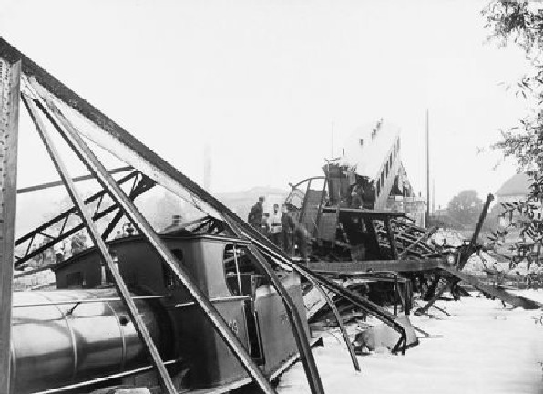 Eisenbahnkatastrophe bei Mönchenstein am 14. Juni 1891. Die zweite Lokomotive des Zug ist von Teilen der Brücke zugedeckt. Dahinter ist der fünfte zerbrochene Personenwagen sichtbar. Dazwischen in der Birs liegen die Trümmer von vier Personenwagen, einem Gepäck- und zwei Postwagen.